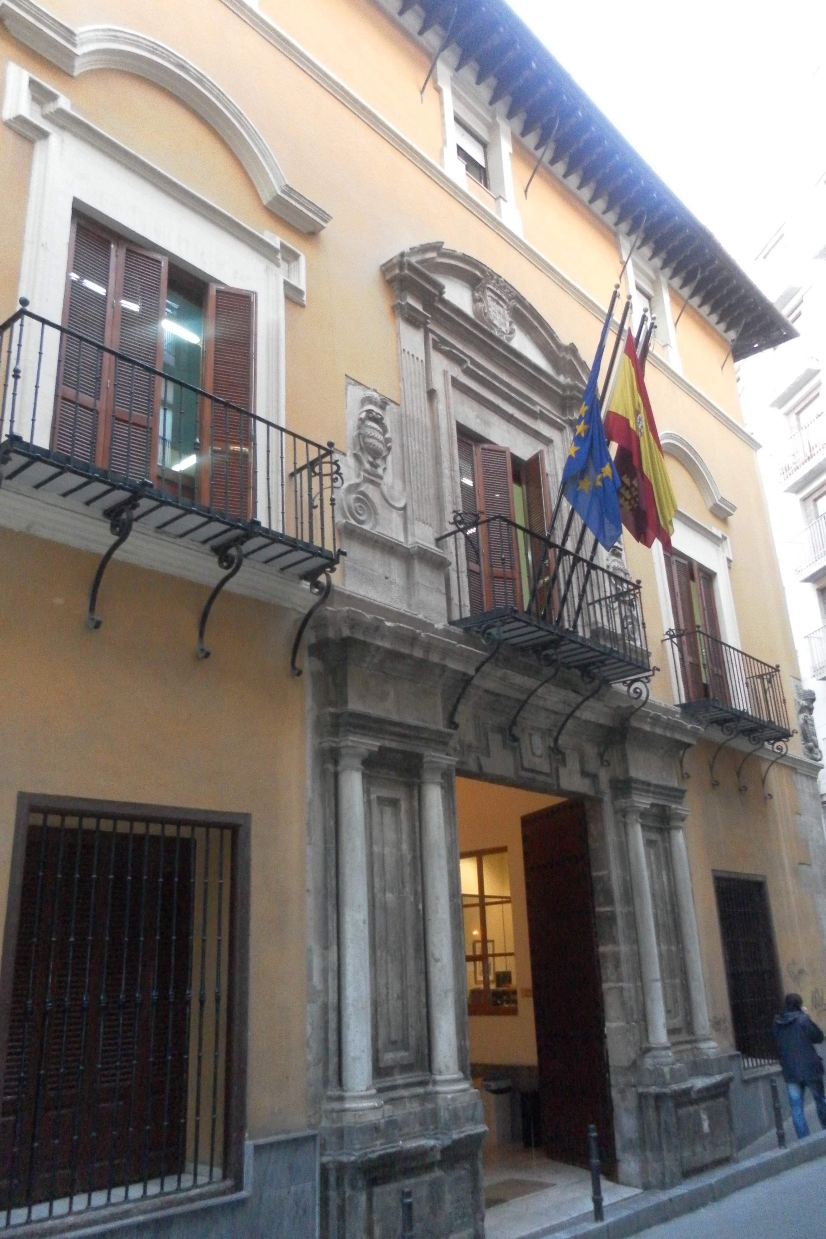 Palacio de los Saavedra. Siglo XVII. Murcia (España).